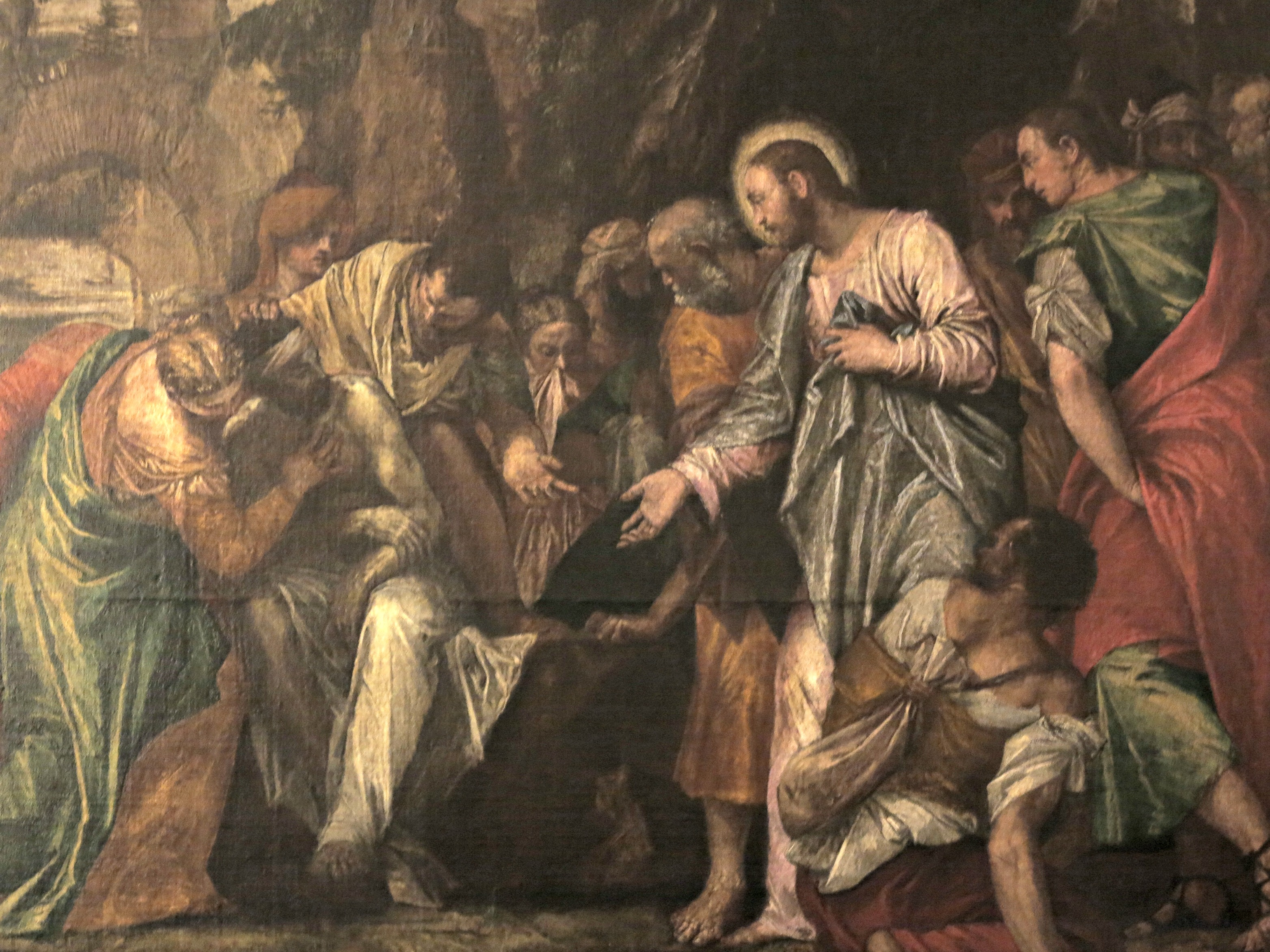 Villa medicea di Poggio a Caiano - MIBAC This is a photo of a monument which is part of cultural heritage of Italy.